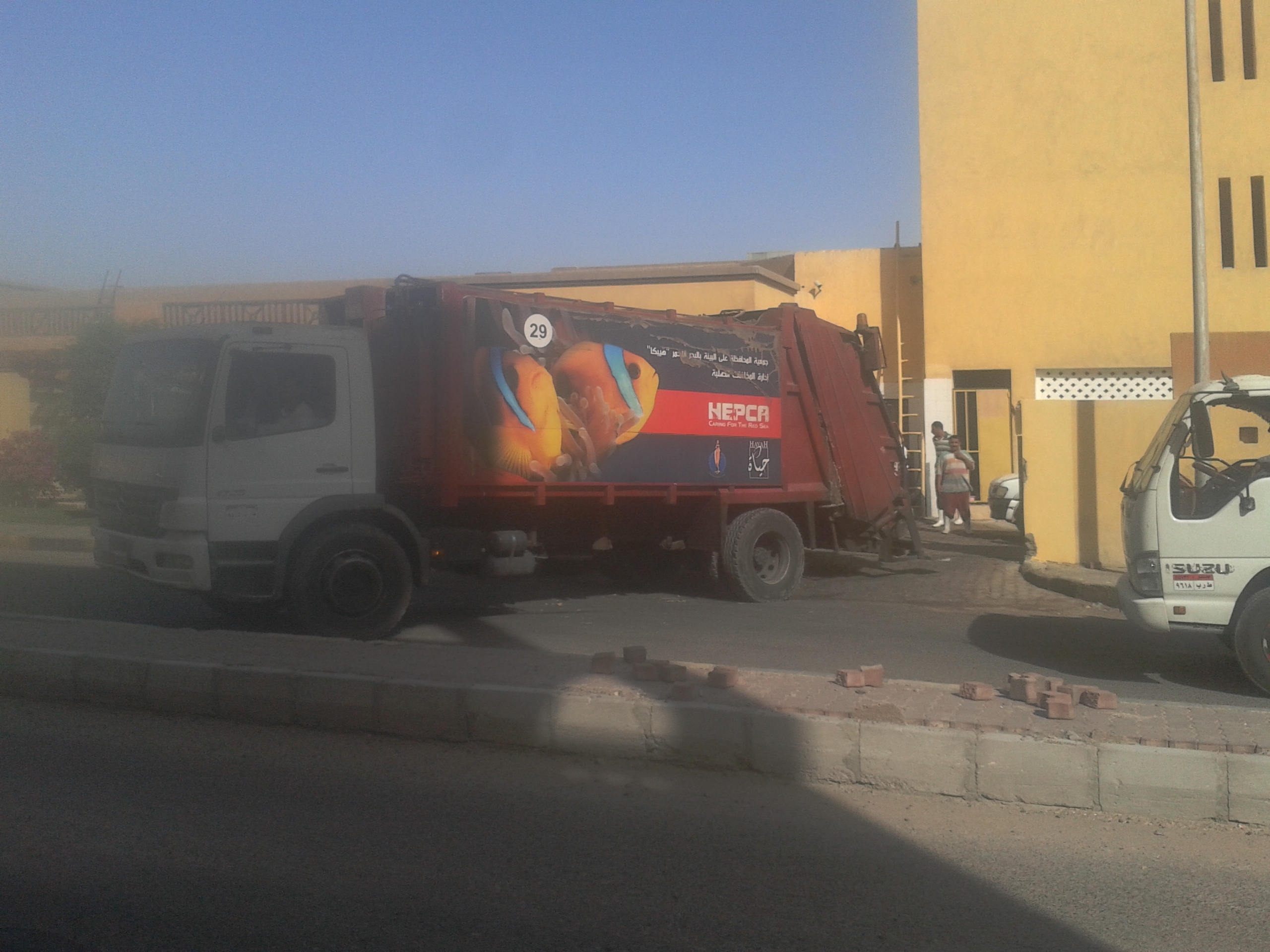 سيارة تابعة ل جمعية هيبكا تقوم بجمع القمامة من الفنادق في الغردقة